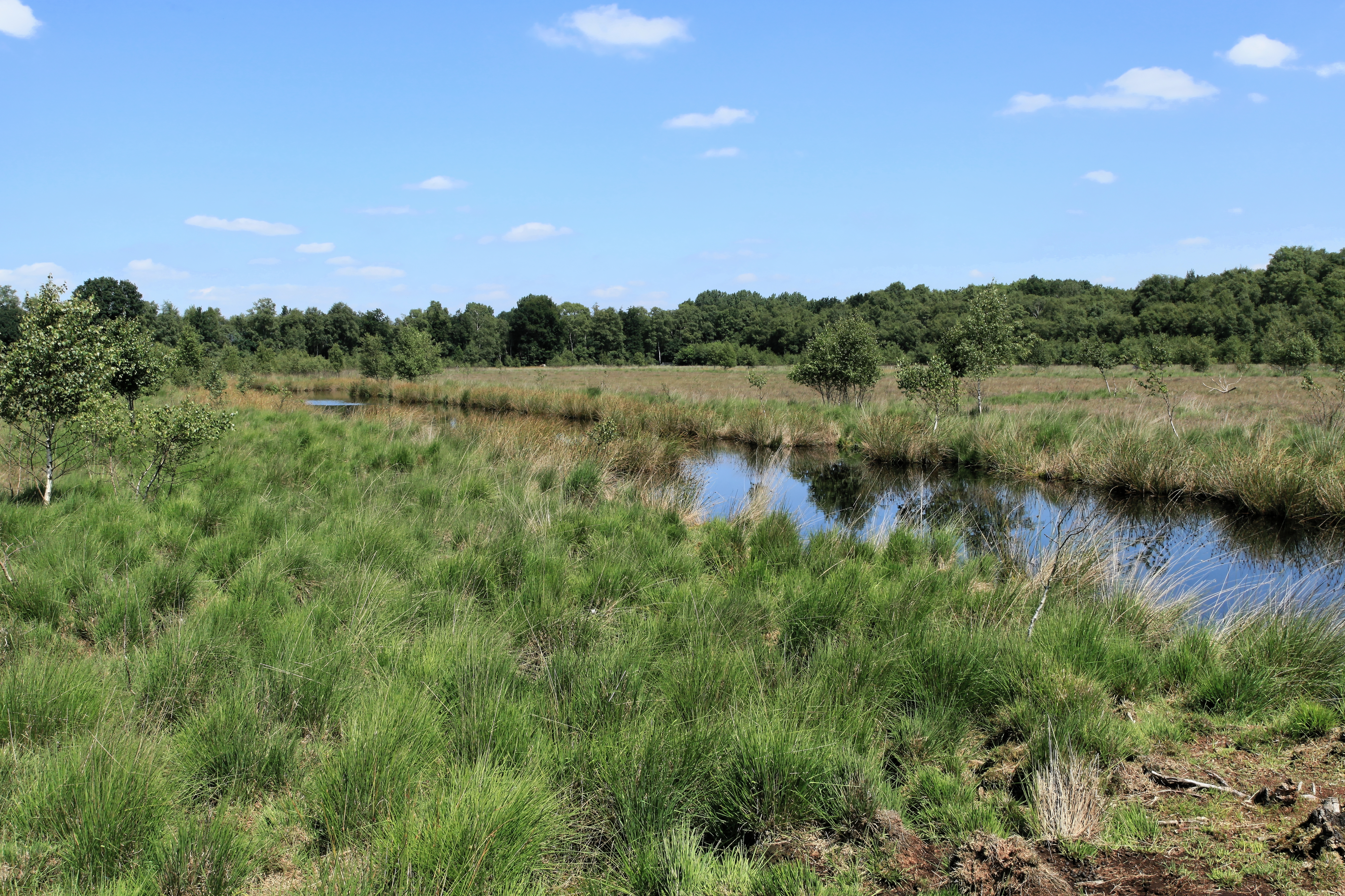 Moorinfopfad Esterwegen im Kuhdammoor des Naturschutzgebietes Melmmoor/Kuhdammoor, Hinterm Busch in Esterwegen